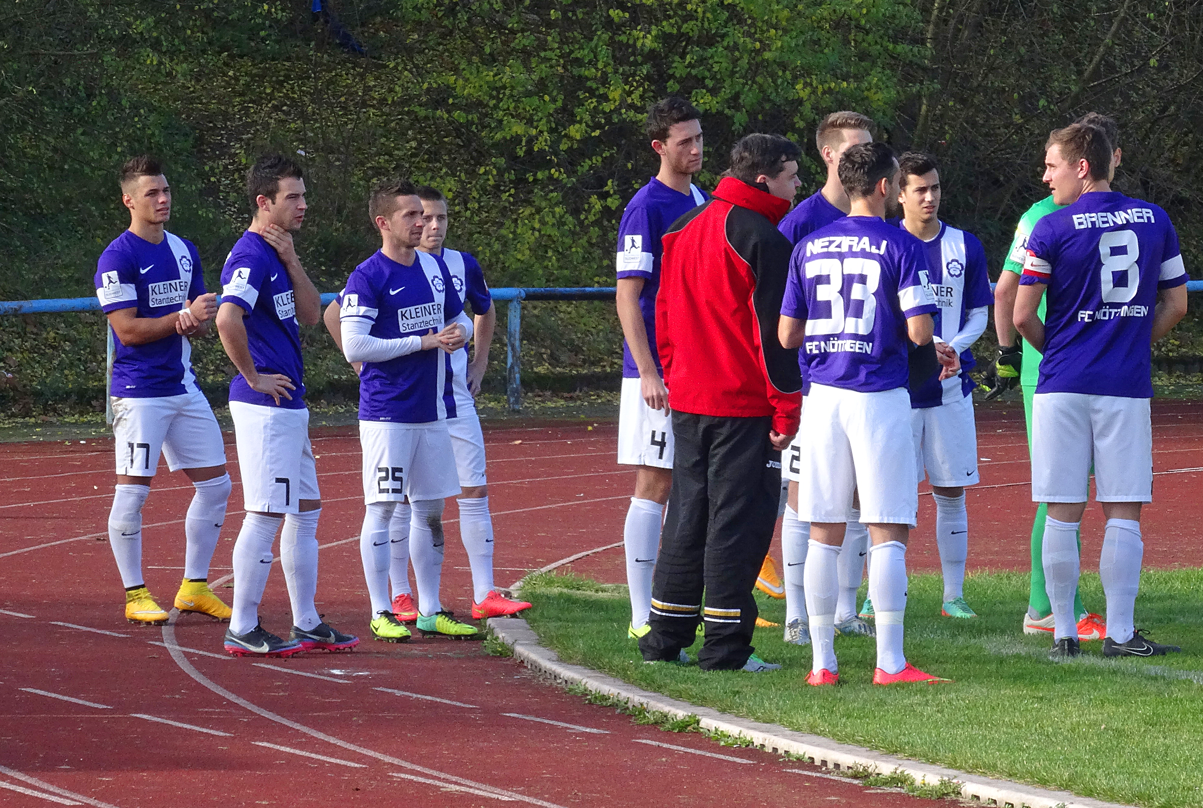 Deutschland: Spieler des FC Nöttingen 1957 vor einem Verbandspokalspiel 2014/15 gegen den FV 1918 Brühl